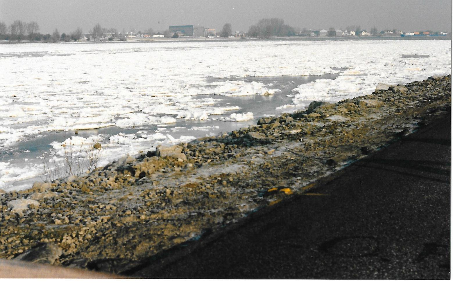 IJsgang in de Merwede, 1997